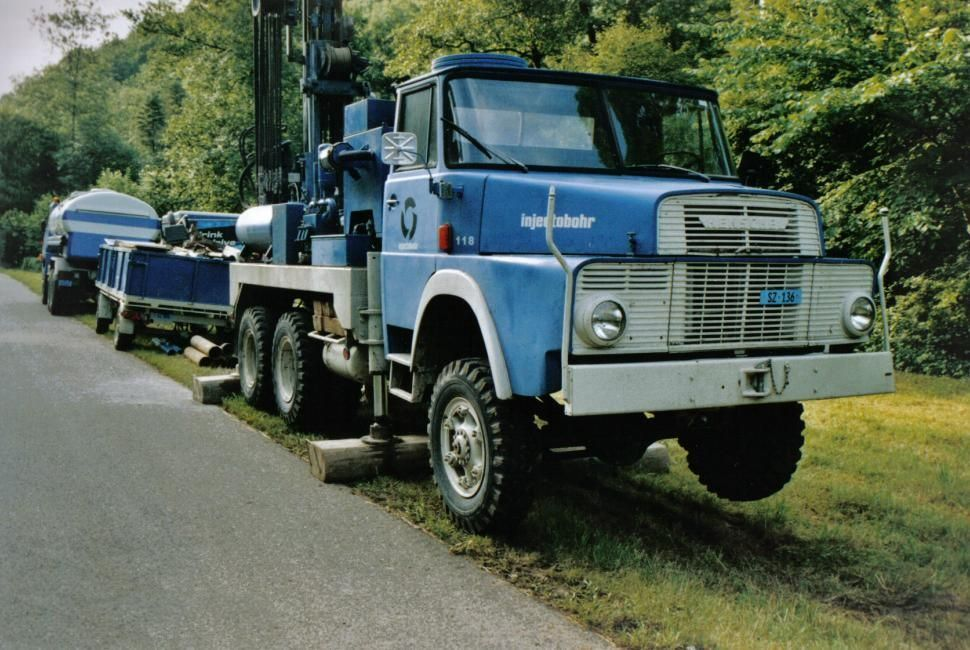 Dieser Henschel wurde noch 2004 für Erdbohrungsarbeiten eingesetzt. Quelle/Fotograf: Richard Bleichmann